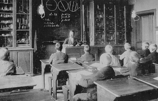 Undervisning på Matteusskolan i Stockholm